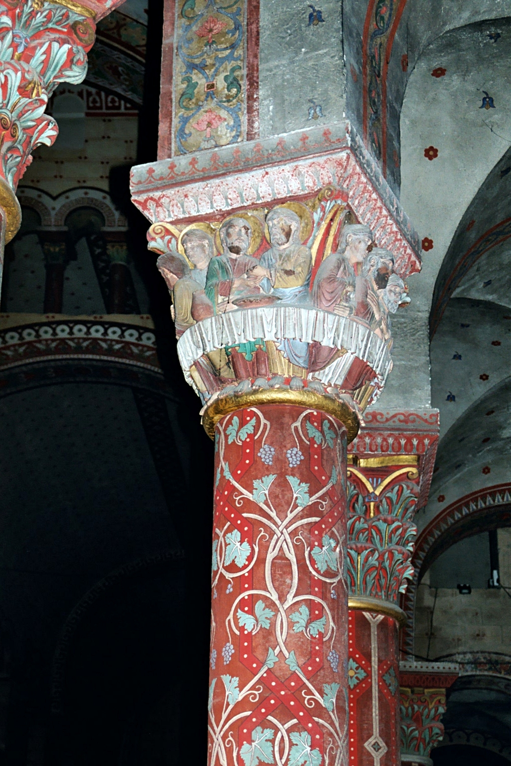 France - Auvergne - Puy-de-Dôme - Église Saint-Austremoine d'Issoire